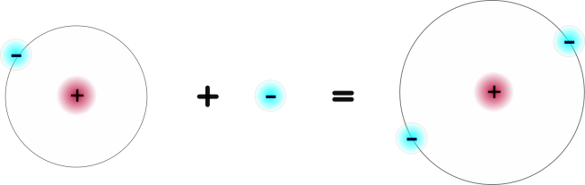 Vesinik aniooni teke